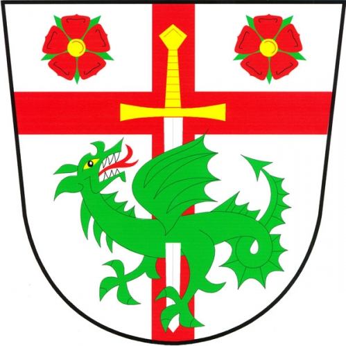 znak, Osové, okres Žďár nad Sázavou